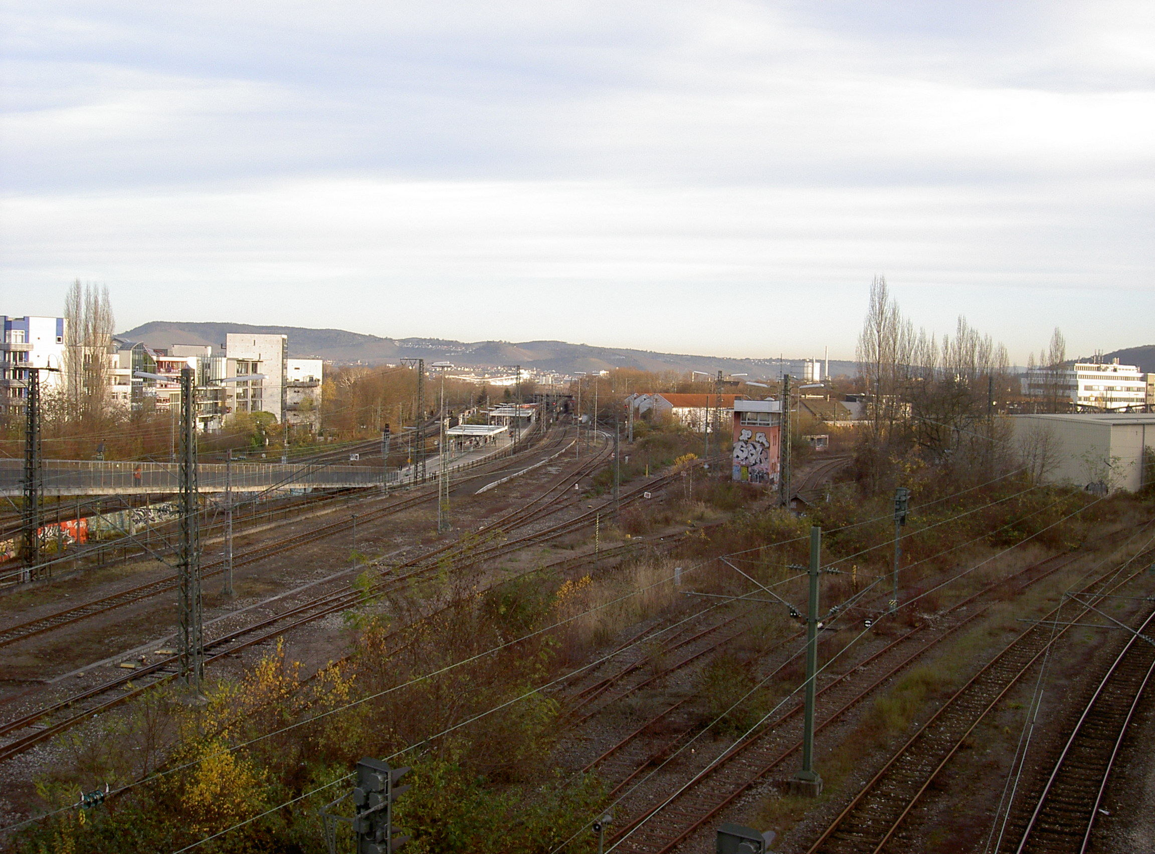 Stuttgart Äußerer Nordbahnhof mit Haltepunkt.